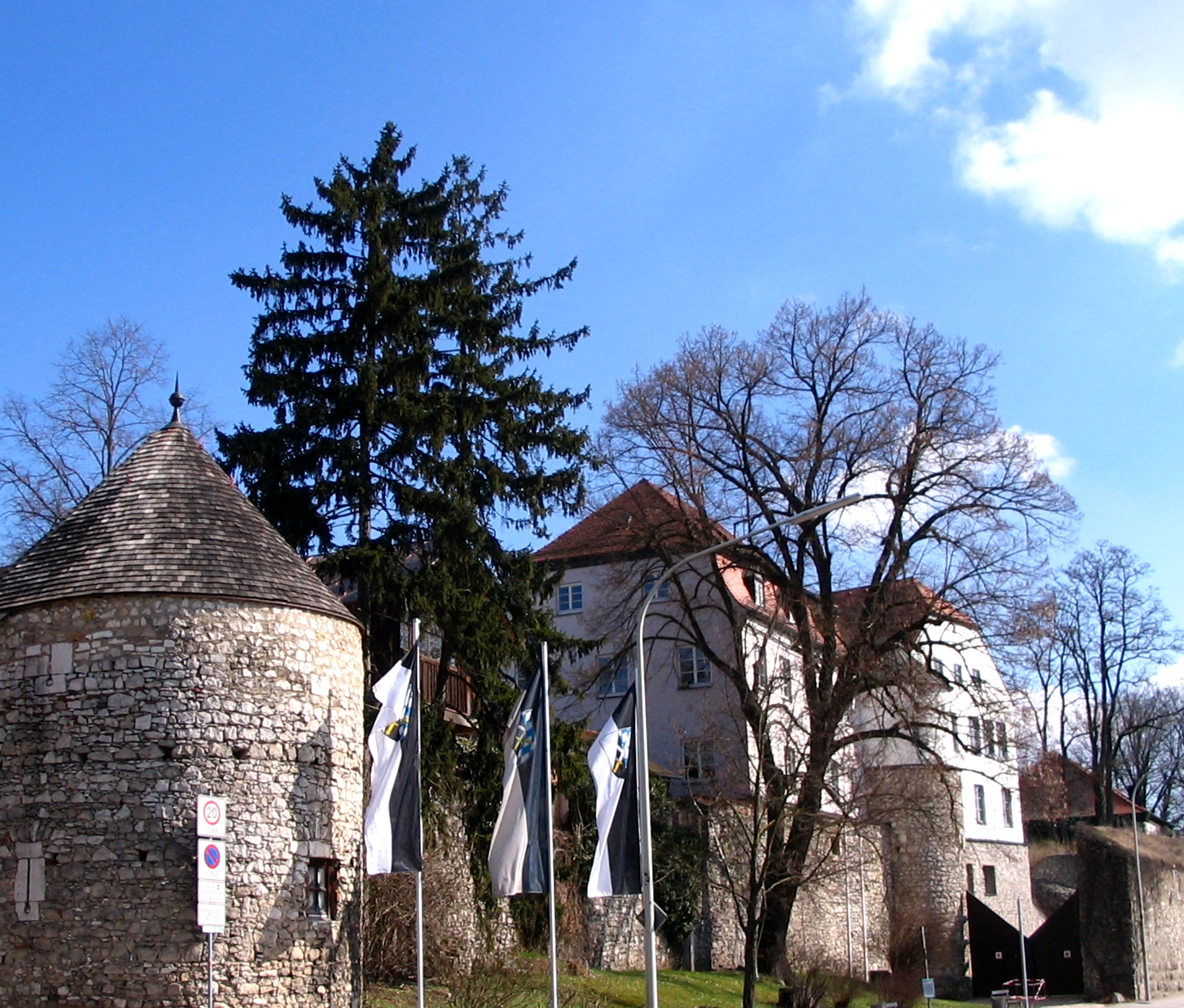 Stadt Abensberg, Landkreis Kelheim, Niederbayern: Schloss Abensberg